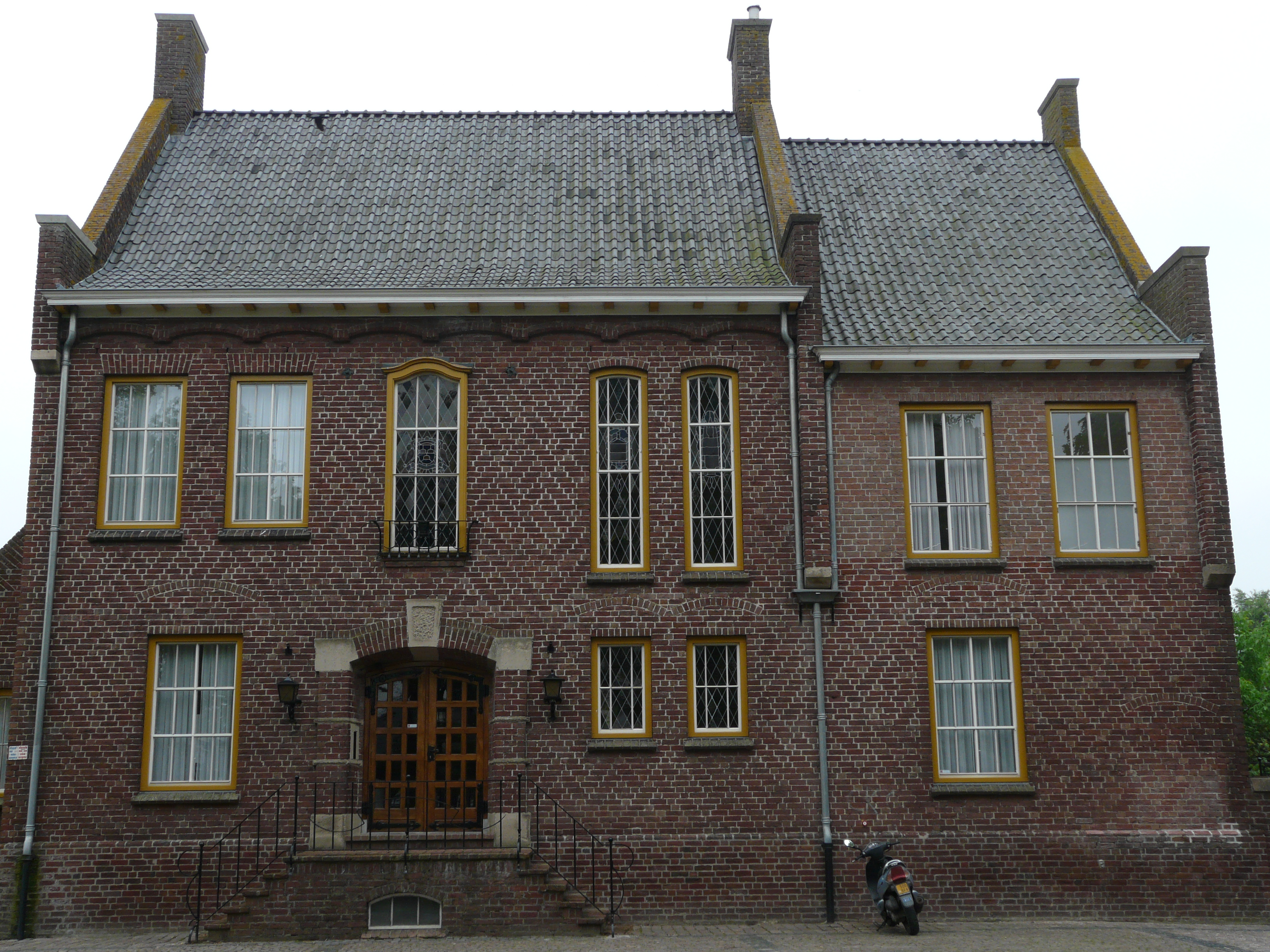 Zijkant van het voormalige Raadhuis Chaam.